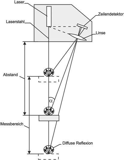 Triangulation